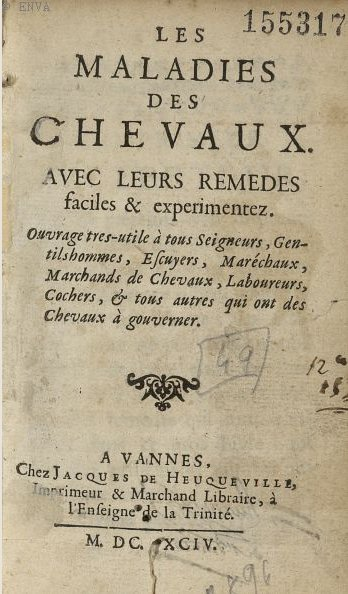 Couverture de l'ouvrage anonyme, Les Maladies des Chevaux, avec leurs remèdes faciles et expérimentez : Ouvrage très-utile à tous seigneurs, gentilshommes, escuyers, maréchaux, marchands de chevaux, laboureurs, cochers et tous autres qui ont des chevaux à gouverner, Vannes, J. de Heuqueville imprimeur-libraire, 1694